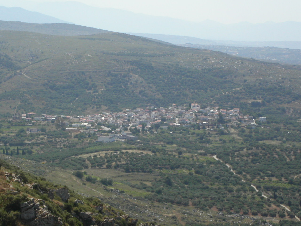 Smarivillage